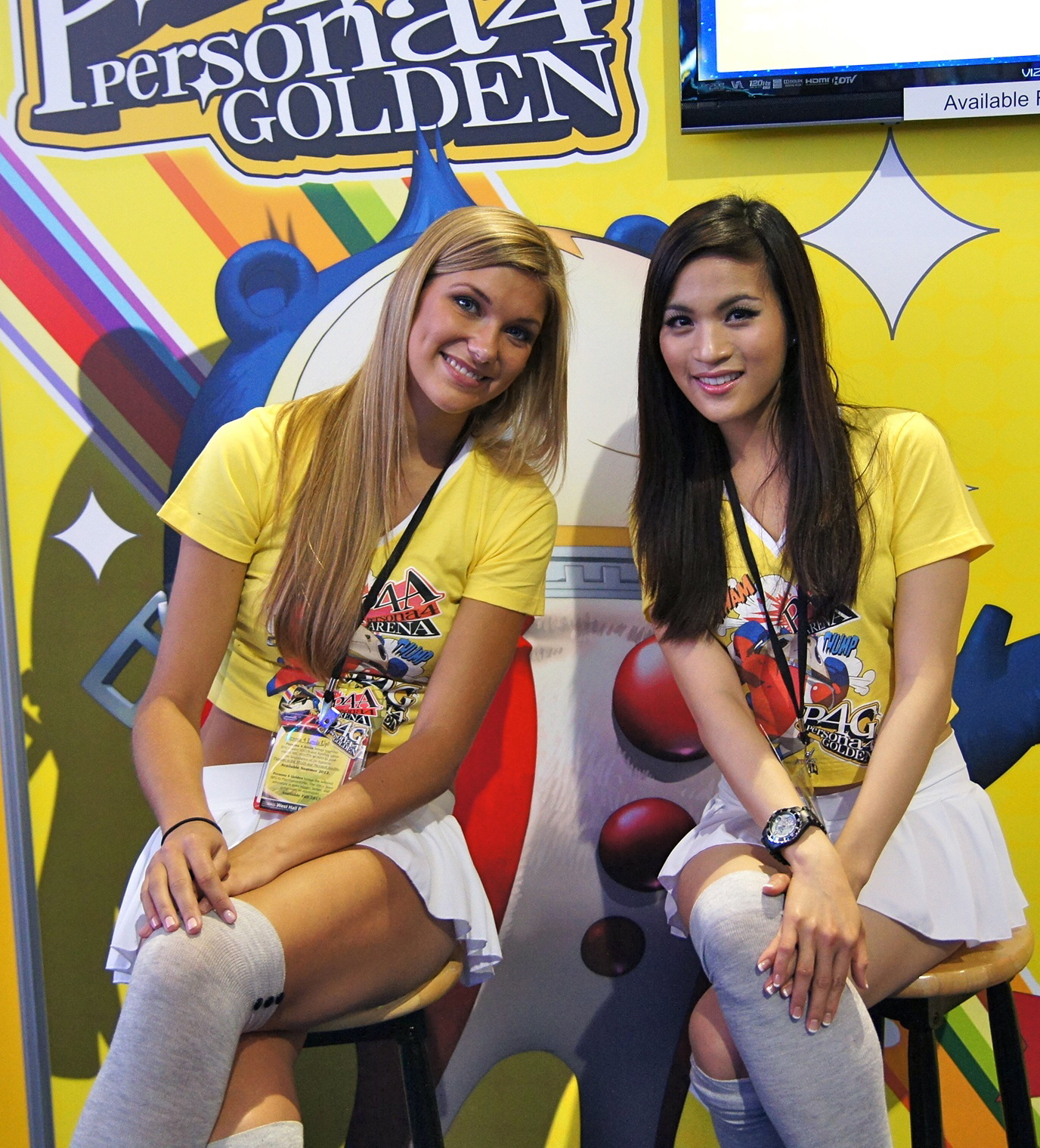 Atlus USA at E3 2012, promoting their game Persona 4 Golden.